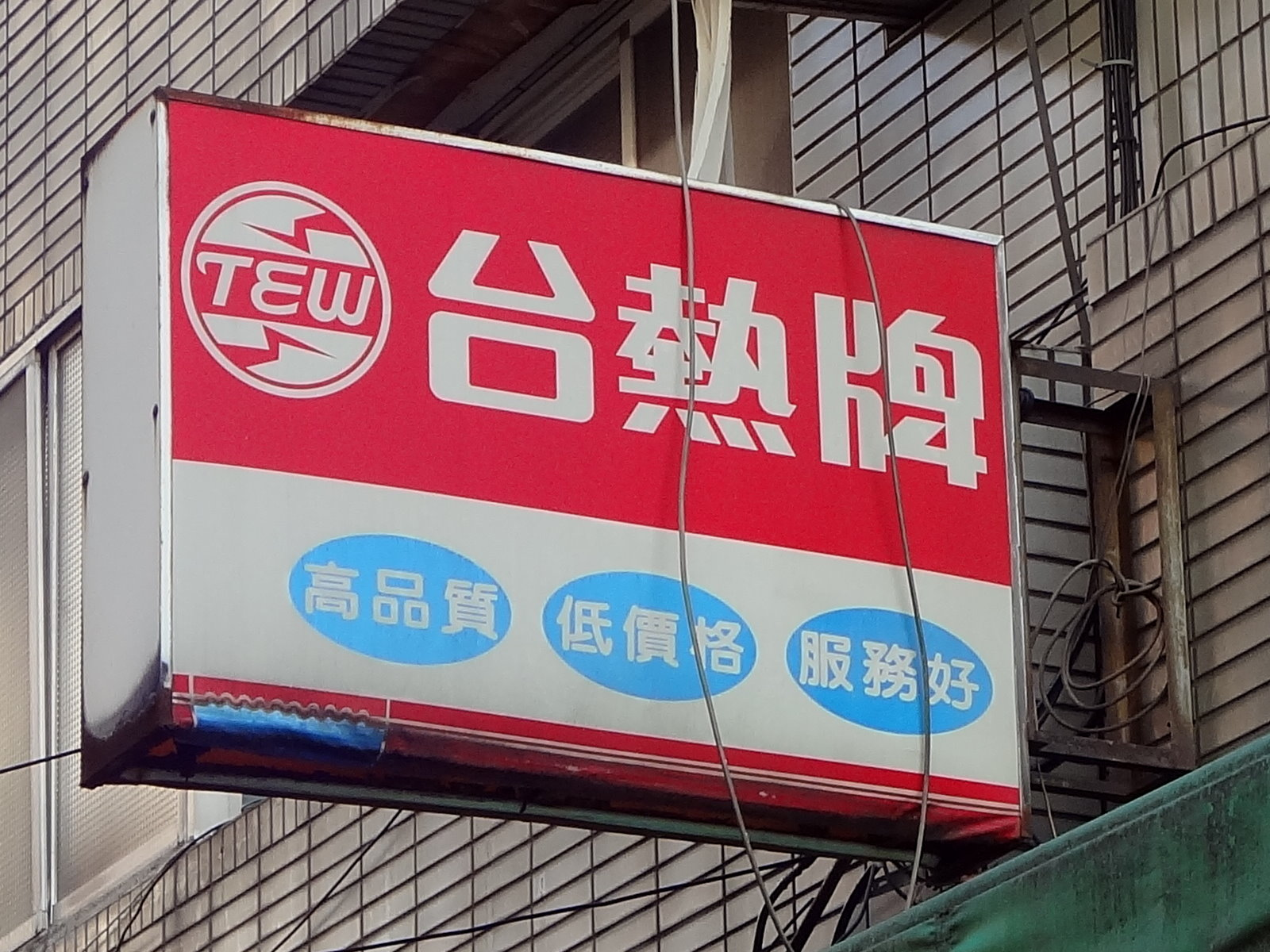 台熱牌經銷店招牌，位於臺北市萬華區中華路二段130巷口。